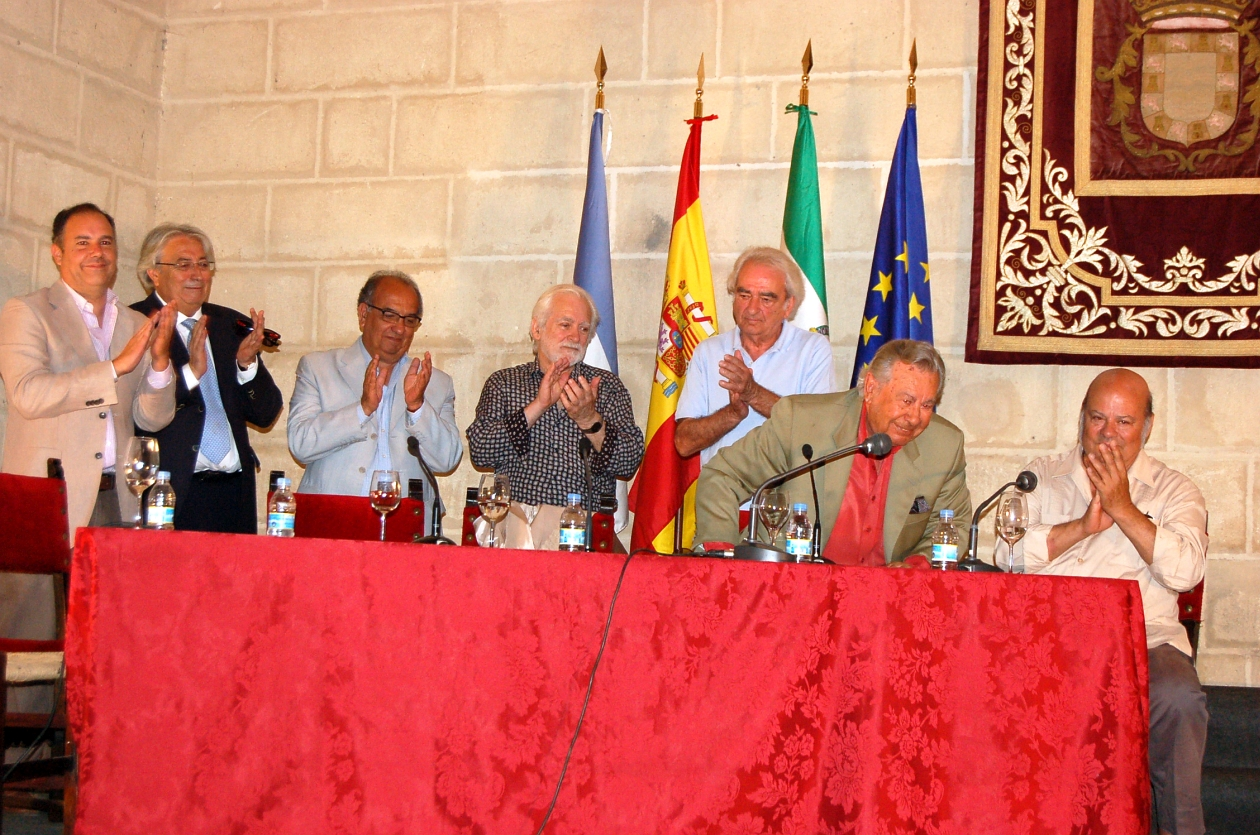 Manuel Morao saluda al público en la clausura del Seminario sobre Manuel Morao,organizado pore el Ayuntamiento de Jerez. Detrás de izquierda a derecha José María Castaño, Antonio Carmona,Juan Manuel Suárez Japón, Manolo Sanlúcar, José María Velázquez-Gaztelu y José Moreno. En primera fila saludando, Manuel Morao